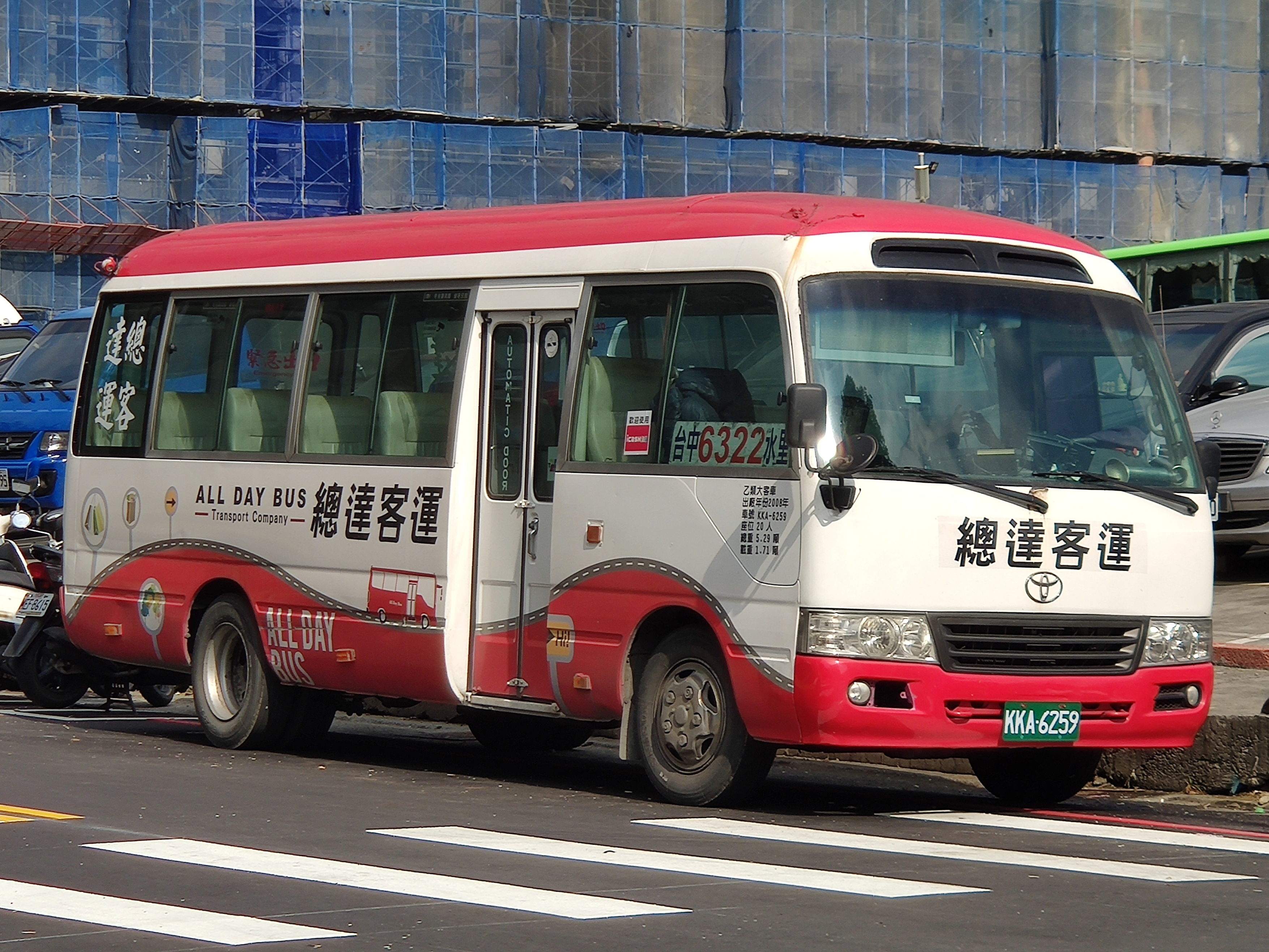 總達客運 豐田Coaster大客車 KKA-6259